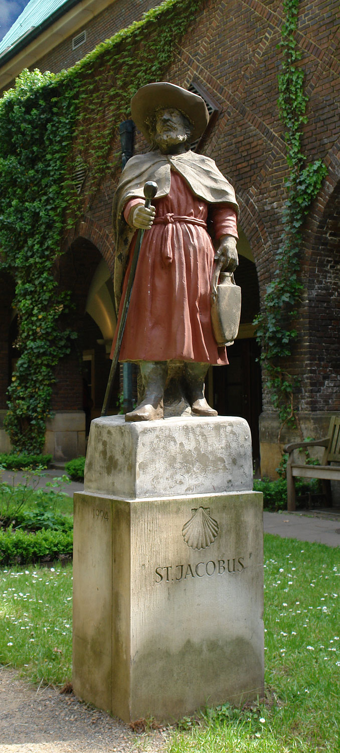 St. Jacobus im Bibelgarten des Bremer Doms Das abgebildete Objekt ist ein geschütztes Kulturdenkmal in der Freien Hansestadt Bremen, mit der Nr. 0179,T001 beim Landesamt für Denkmalpflege registriert.